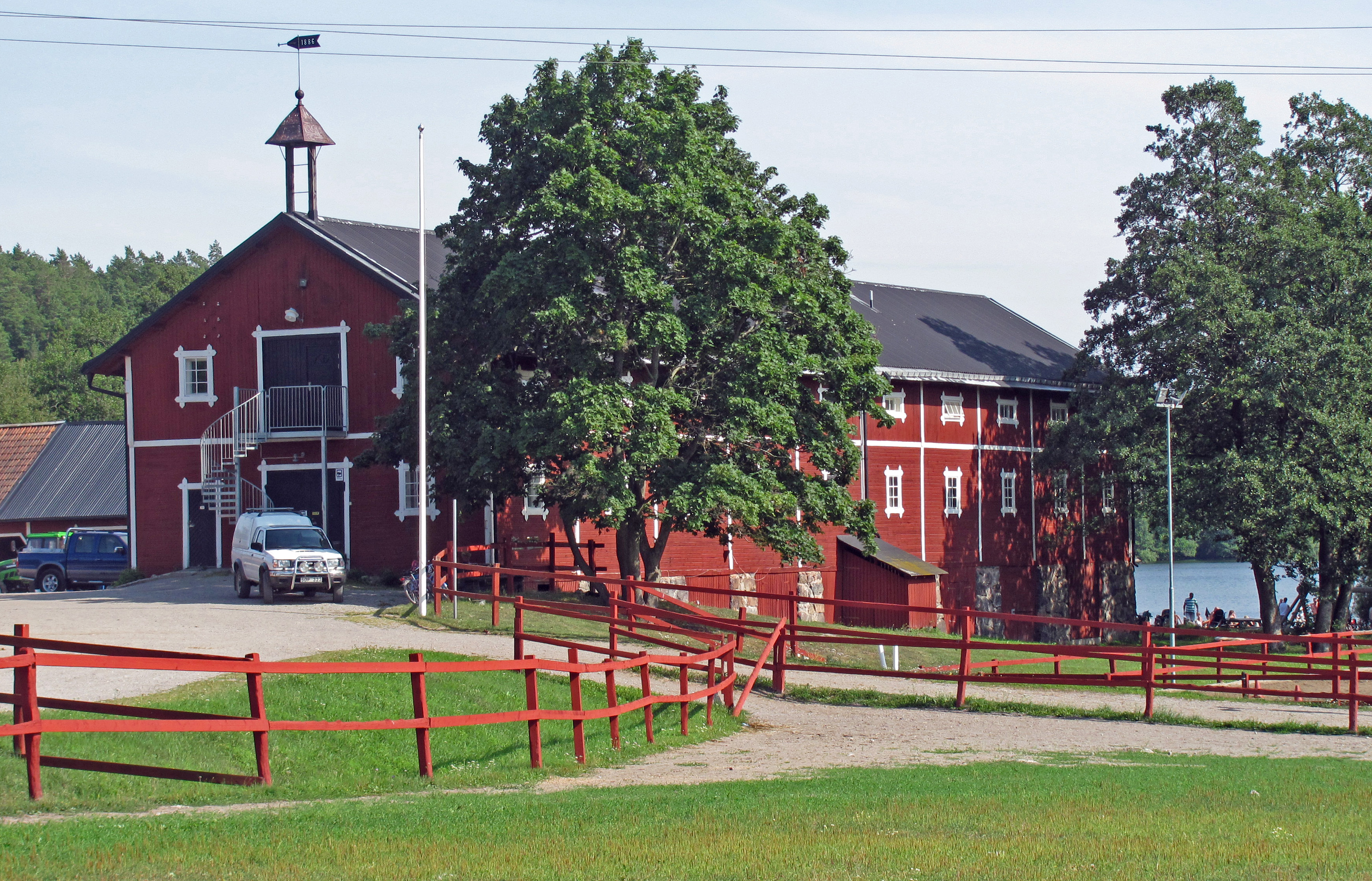 Velamsund, magasinet